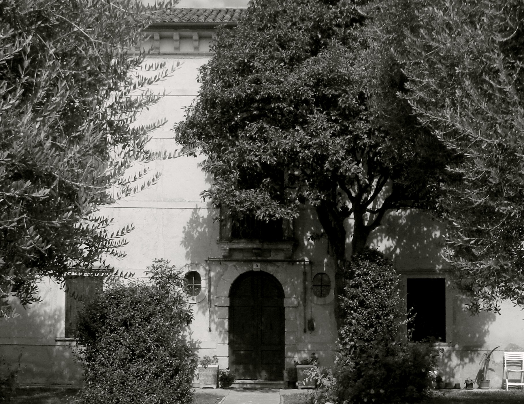 Castello Roganzuolo (San Fior, Treviso): Villa Sanfiori (XVIII sec.), parte centrale, col portale.